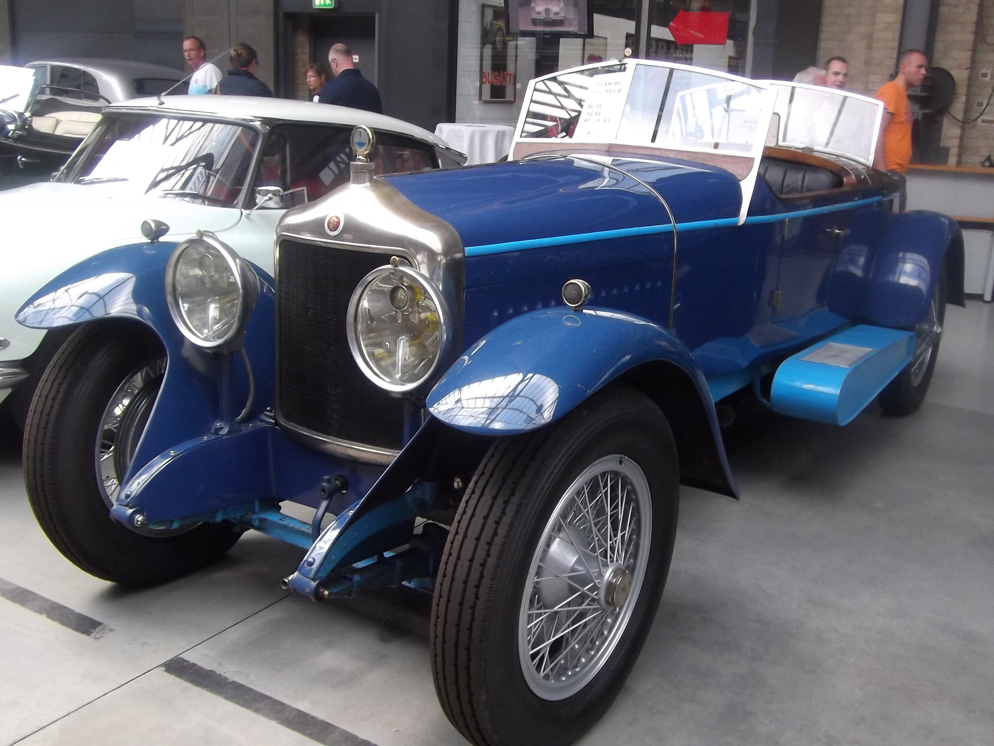 Typ leider unbekannt